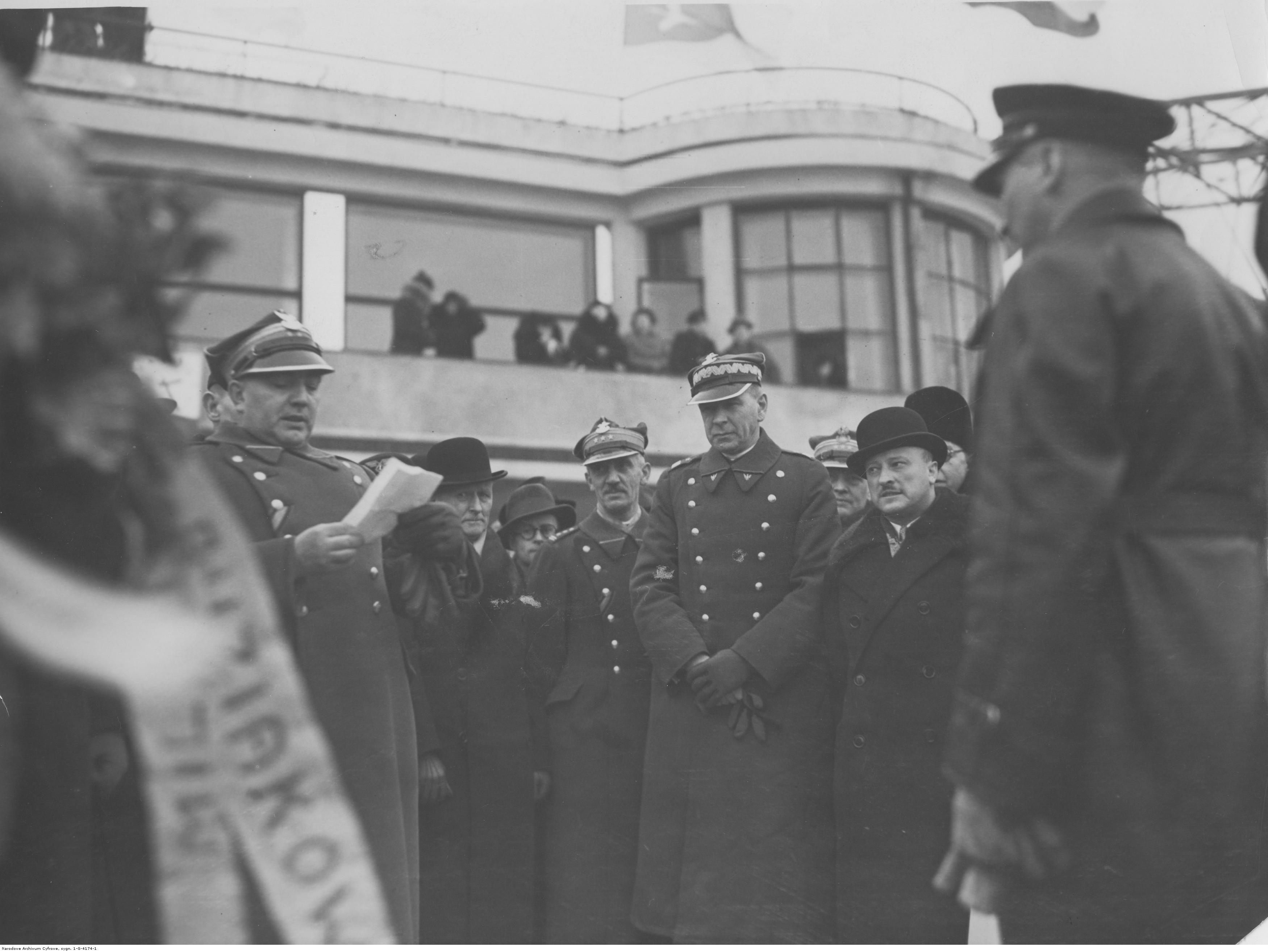 Uroczystość na lotnisku Okęcie z okazji przelotu przez pilota Kazimierza Burzyńskiego 1.000.000 km w służbie lotnictwa komunikacyjnego. Przemawia dyrektor departamentu lotnictwa cywilnego Ministerstwa Komunikacji ppłk Tomasz Turbiak, w centrum gen. bryg. Ludomił Rayski.